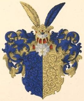 Plettenbergi suguvõsa aadlivapp